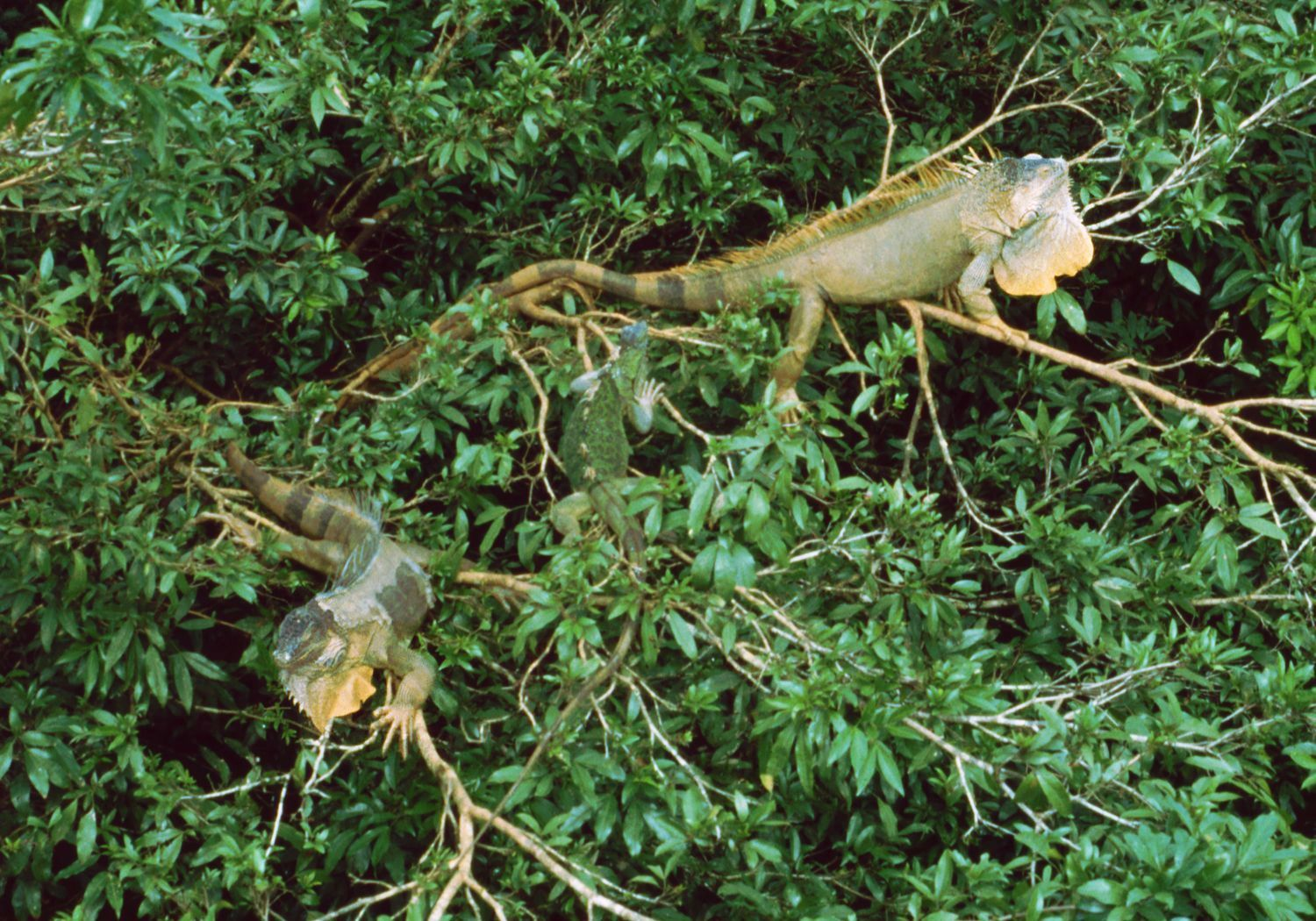 Grüne Leguane (Iguana iguana), Iguanidae, zwei Erwachsenen und ein Jungtier in der Mitte/two adults and a pup in the middle - Costa Rica: Prov. Alajuela, Muelle de San Carlos